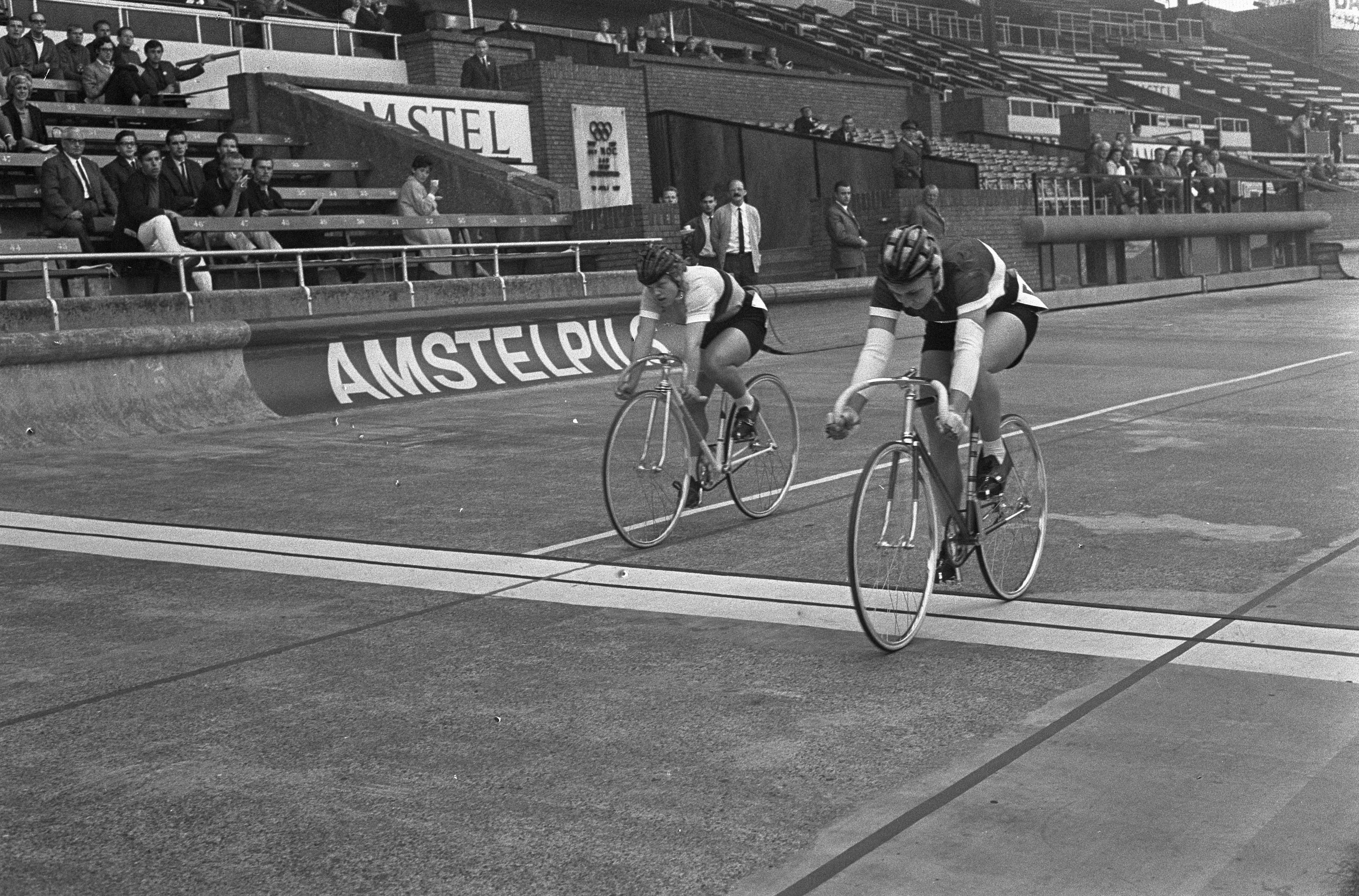 Collectie / Archief : Fotocollectie Anefo Reportage / Serie : [ onbekend ] Beschrijving : WK Wielrennen, eerste serie sprint dames. Hier wint de Russische Ermolaeva (rechts) tegen Oost-Duitse Blobner Datum : 25 augustus 1967 Locatie : Amsterdam Trefwoorden : baanwielrennen, sport Persoonsnaam : Blobner, Heidi, Ermolaeva, Ermina Fotograaf : Koch, Eric / Anefo, [onbekend] Auteursrechthebbende : Nationaal Archief Materiaalsoort : Negatief (zwart/wit) Nummer archiefinventaris : bekijk toegang 2.24.01.05 Bestanddeelnummer : 920-6345